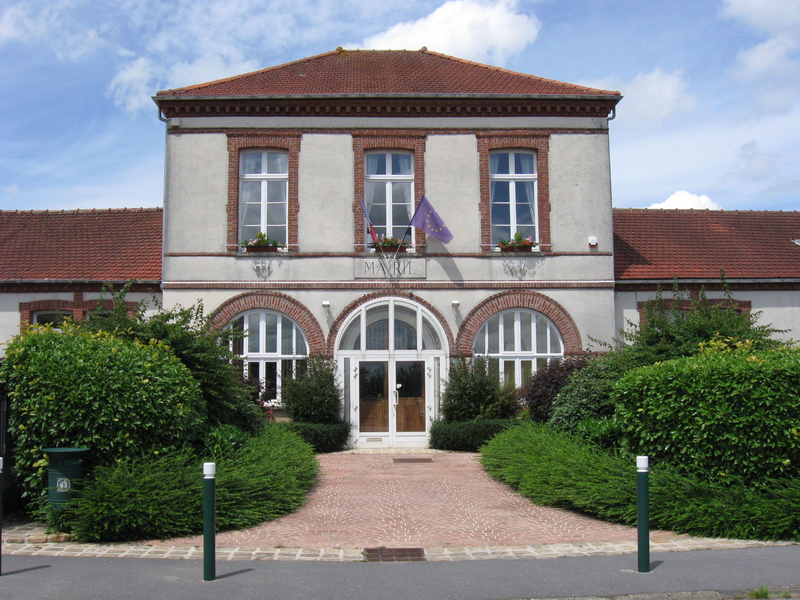 Mairie de Choisy-en-Brie. (Seine-et-Marne, région Île-de-France).